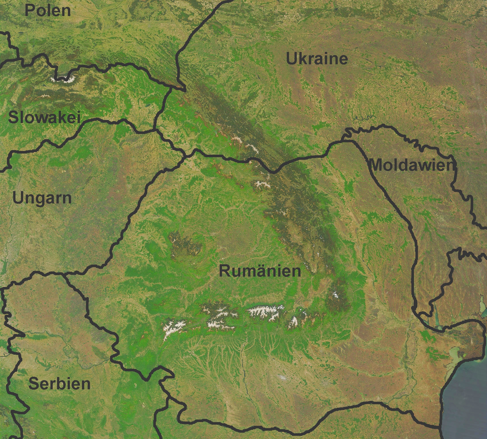 Satellitenfoto der Karpaten aus dem Visible Earth Project der NASA